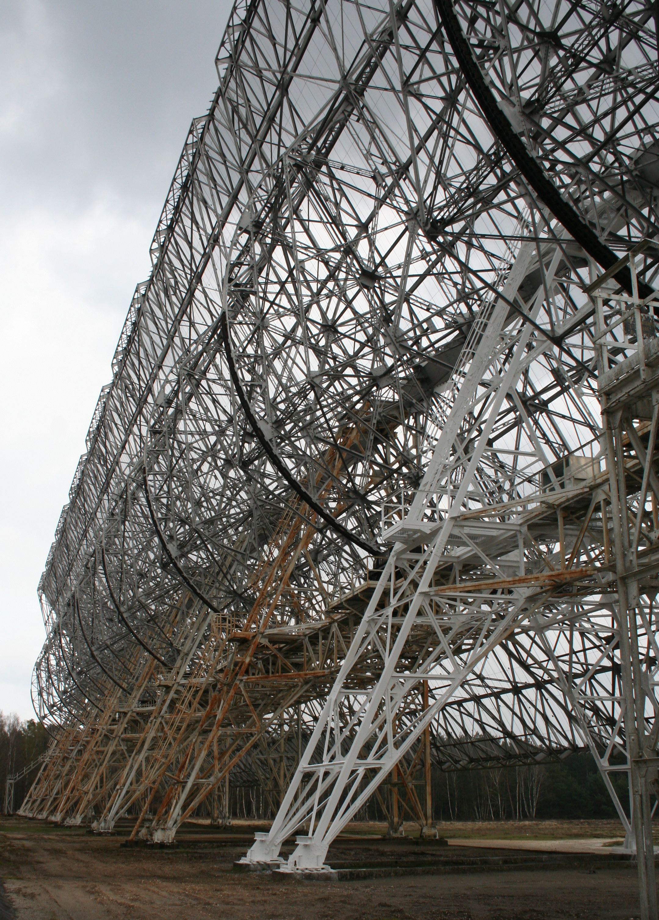 Arrière du miroir plan du Grand Radiotélescope de Nançay